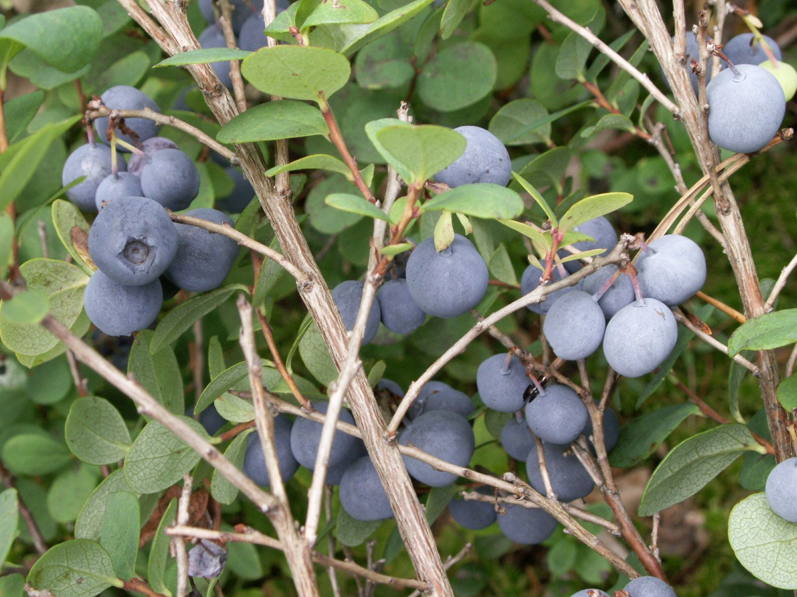 reife Rauschbeeren